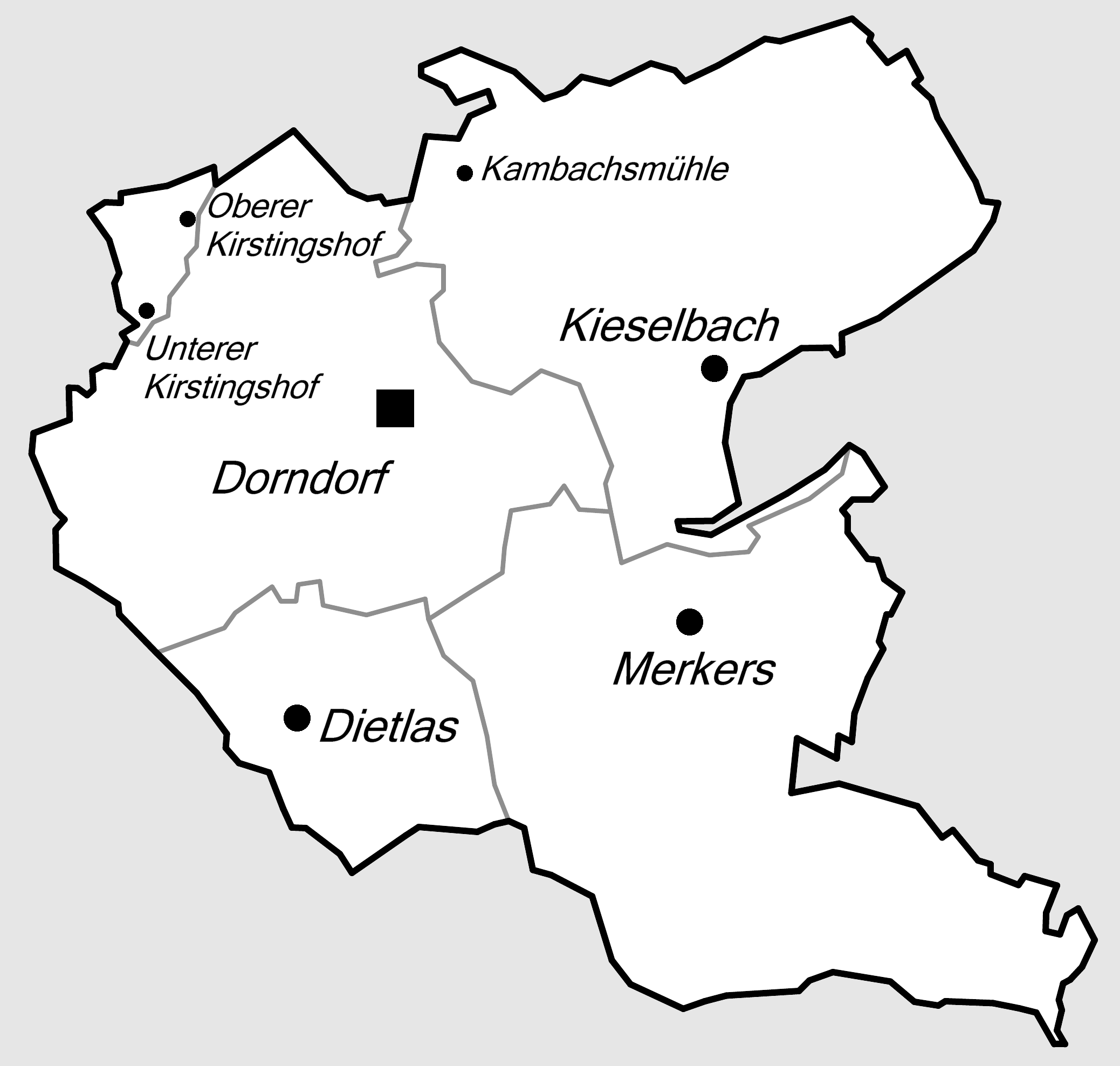 Lagekarte zur Krayenburggemeinde.